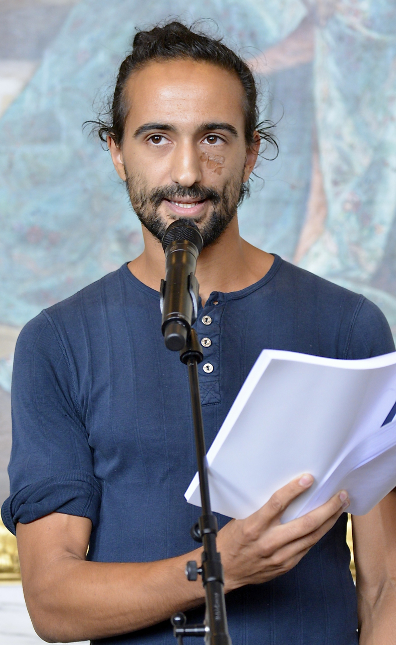 Hamadi Khemiri under Dramatens höstsamling 2014.